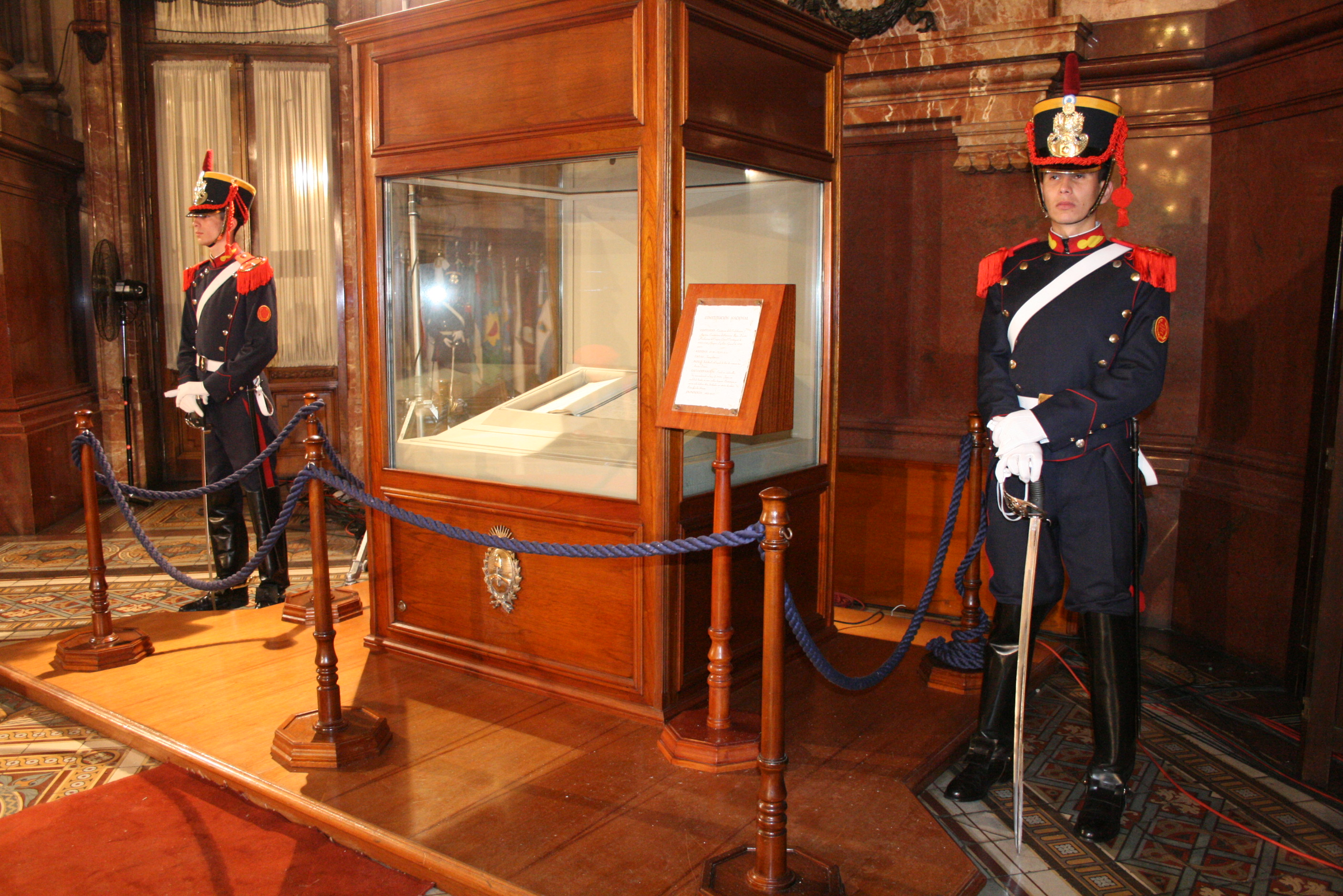 Congreso de la Nación Argentina